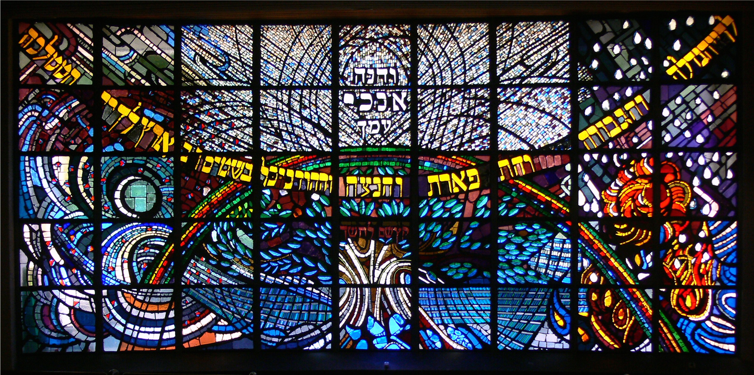 Oeuvre de Régine HEIM, réalisée en 1980. Vitrail sur structure métallique formé de 45 dalles de mortier dans lesquelles sont insérés des roches de verre et des cristaux naturels saillants formant une formidable mosaïque aux couleurs variées. Le vitrail est une représentation moderne de la Genèse.